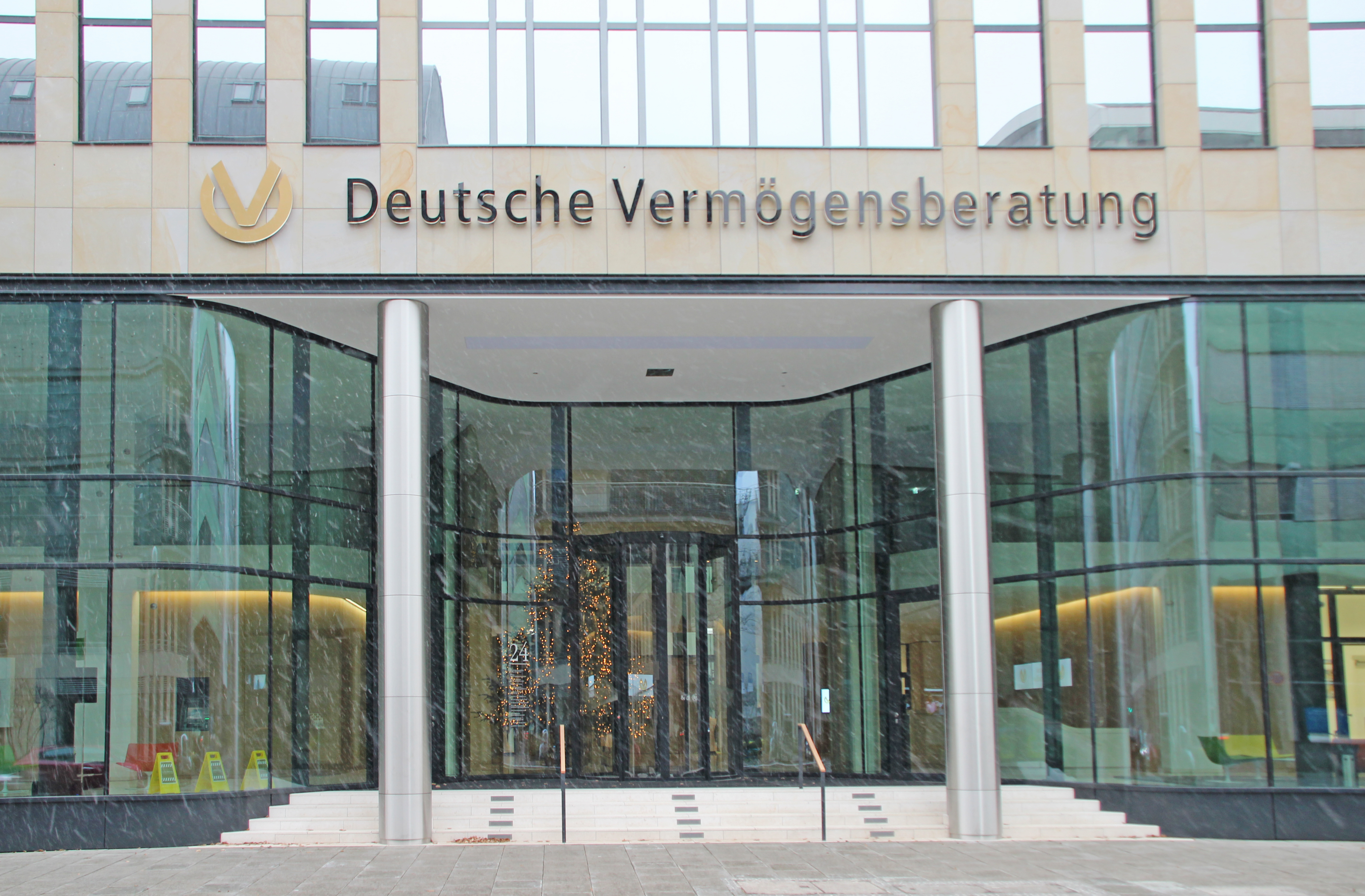 Bildinhalt: Haupteingang der DVAG-Zenrale von Süd-Osten aus gesehen, Wilhelm-Leuschner-Straße Aufnahmeort: Frankfurt am Main, Deutschland